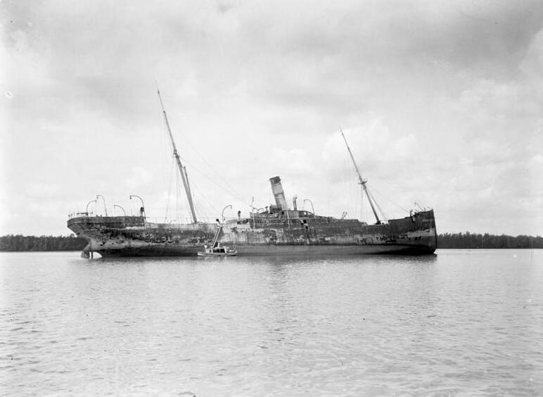 Frachter